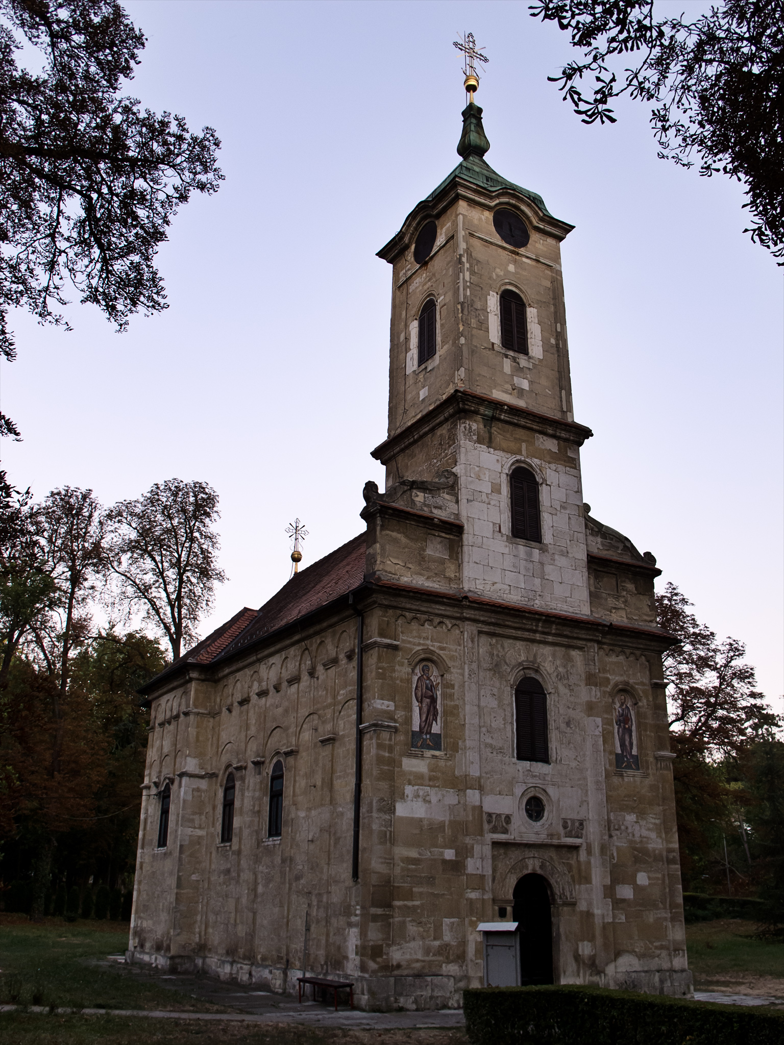 Топчидерска црква (Црква Св.Апостола Петра и Павла), Булевар Војводе Путника 11, Београд, Србија